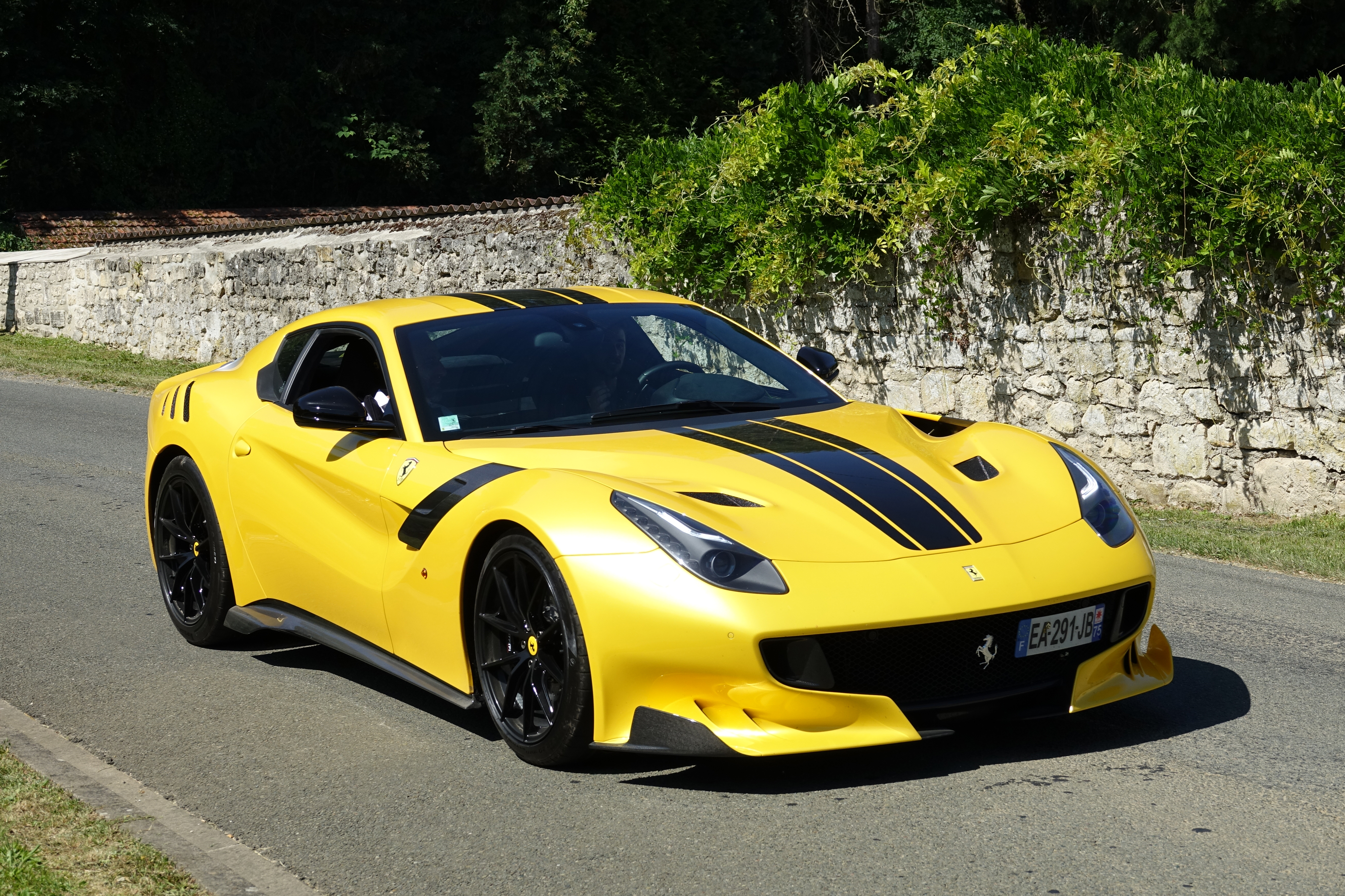 Rallye Supercars au Chantilly Arts & Elegance Richard Mille 2019